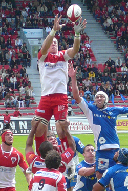 Imanol Harinordoquy levé en touche lors du match Biarritz olympique-Montpellier HRC du 24 mai 2008 (Top 14)